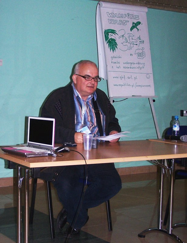 Jan Plata-Przechlewski na konwencie Polcon 2007 w Warszawie.